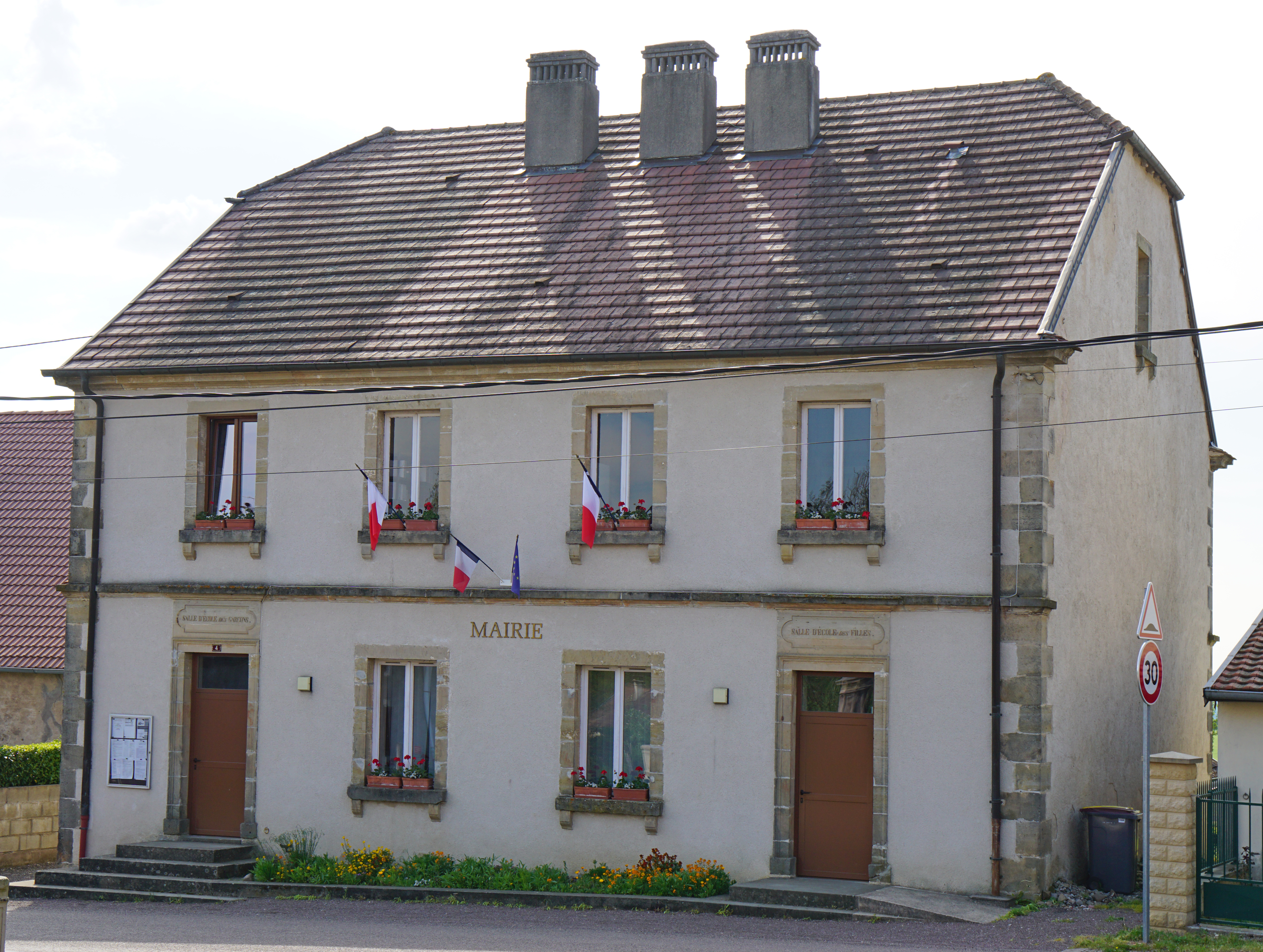 La mairie de Châtenois (Haute-Saône).